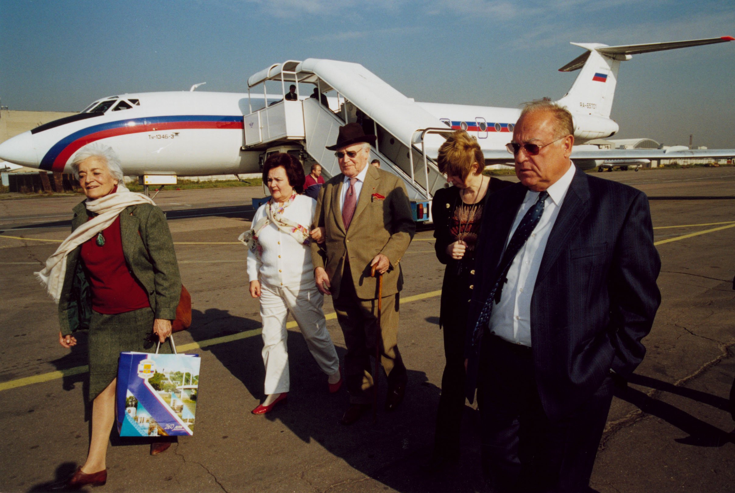 Морис Дрюон и Виктор Черномырдин. Оренбург. 2003 г.